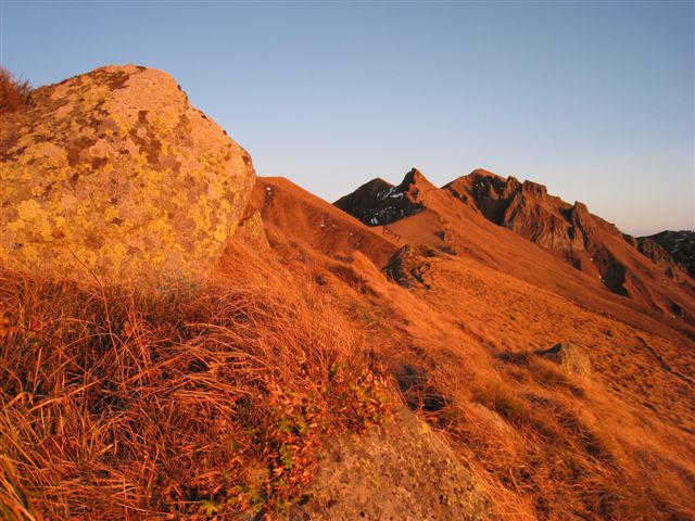 Thierry Leroy